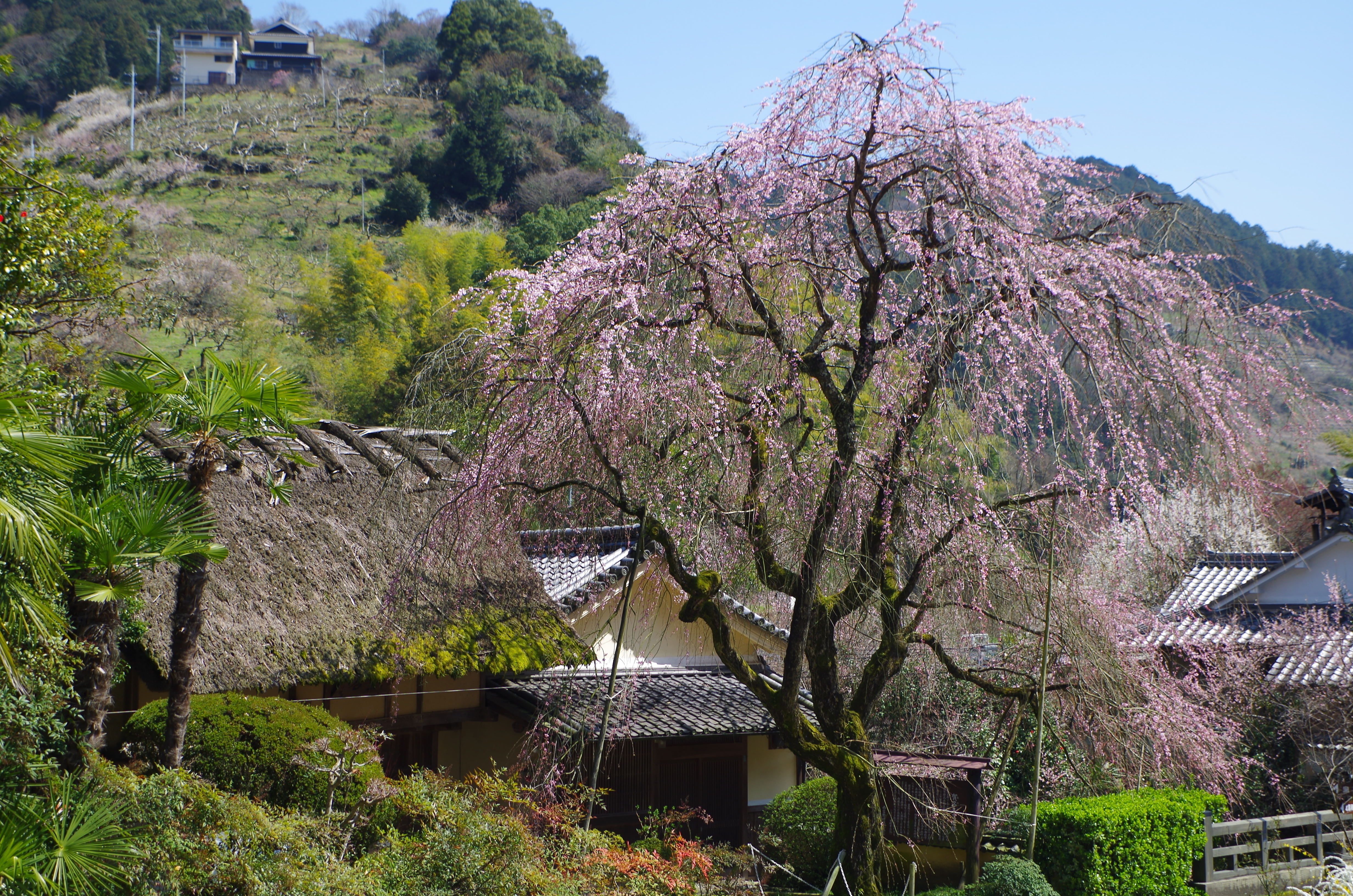 賀名生皇居跡(重要文化財堀家住宅) 2014.3.28